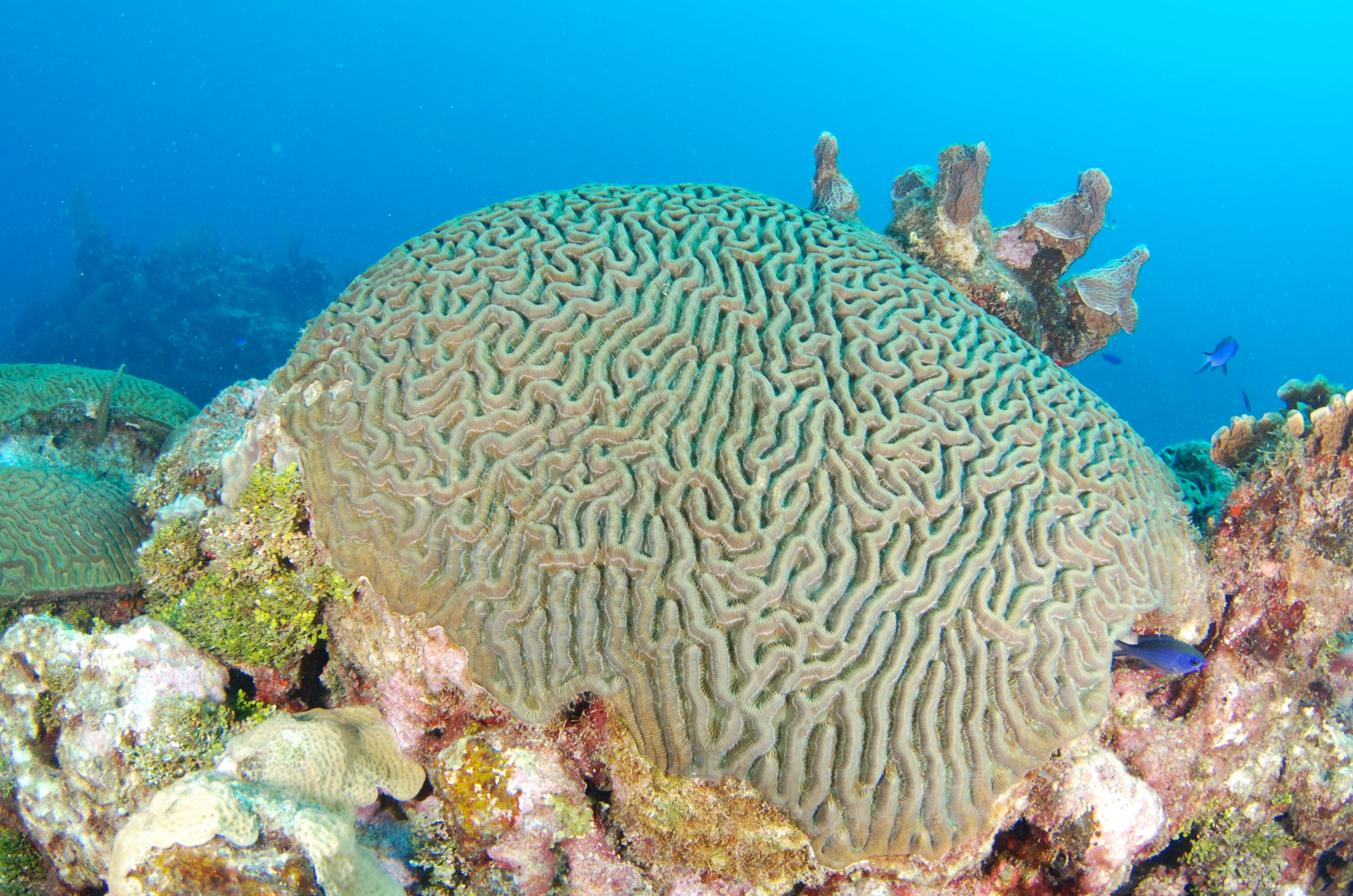 Diplora strigosa